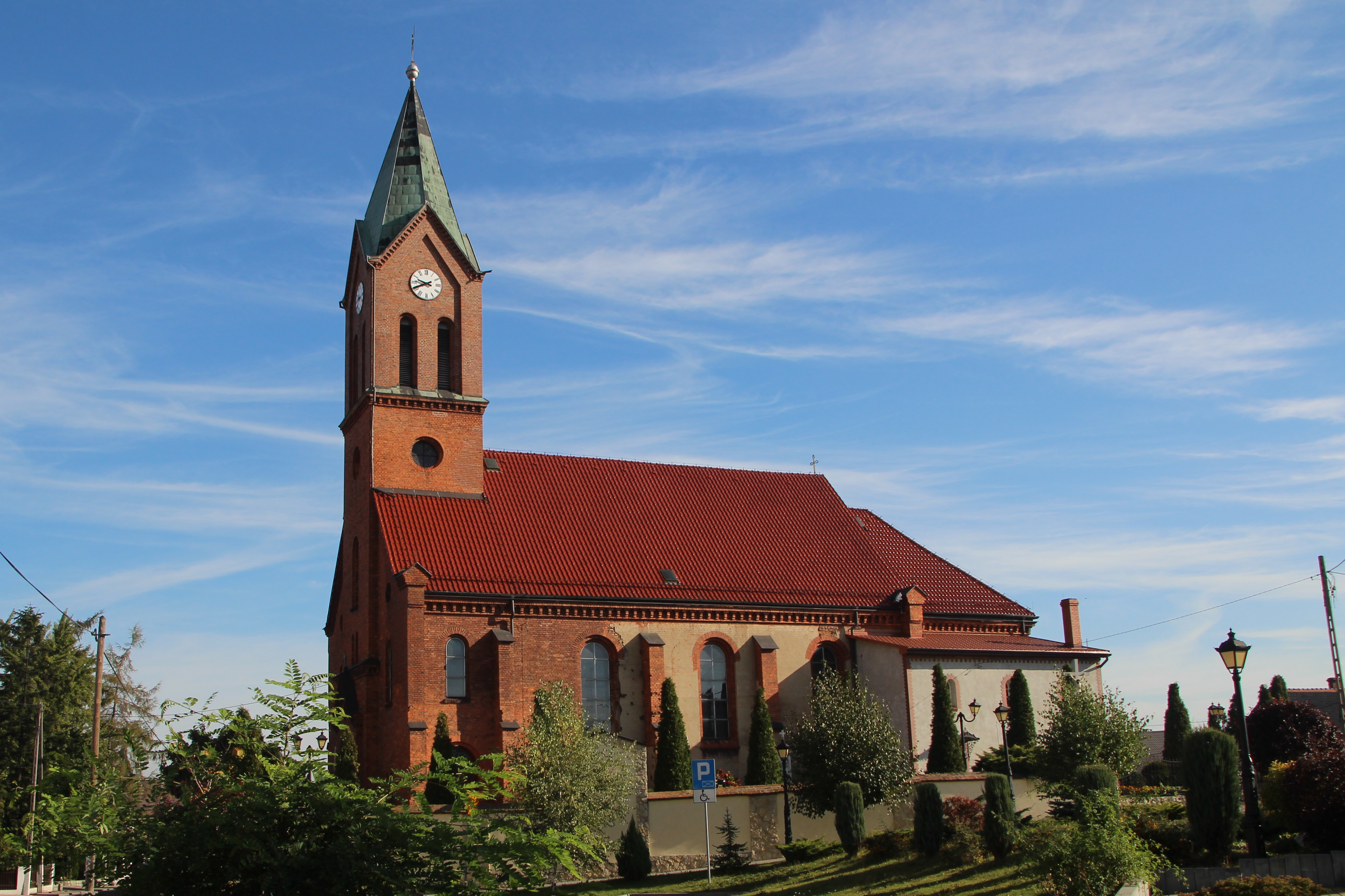 Ostrożnica - rzymskokatolicki kościół parafialny pw. Ducha Świętego